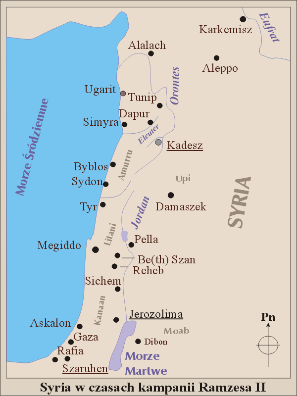 Schematyczna mapa Syrii w czasach wojen Ramzesa II